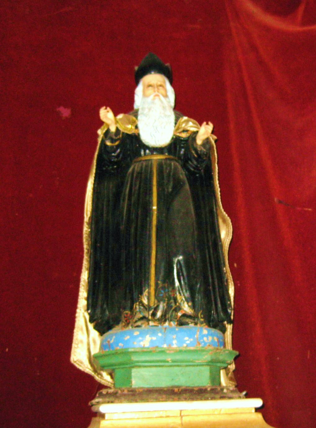 Santo Patrono del Pueblo de San Juan de Cinco Pinos.